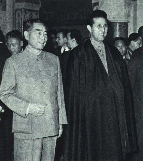 1964-03 1964年 中国访问阿尔及利亚 周恩来与本·贝拉总统